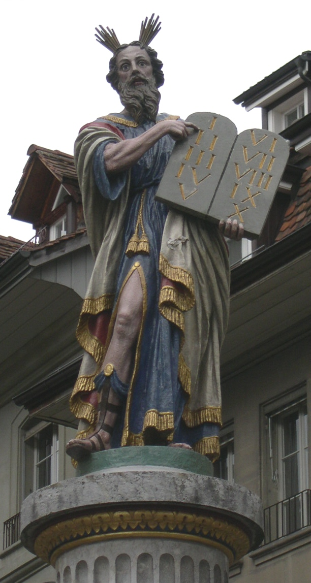 Der Mosesbrunnen in Bern